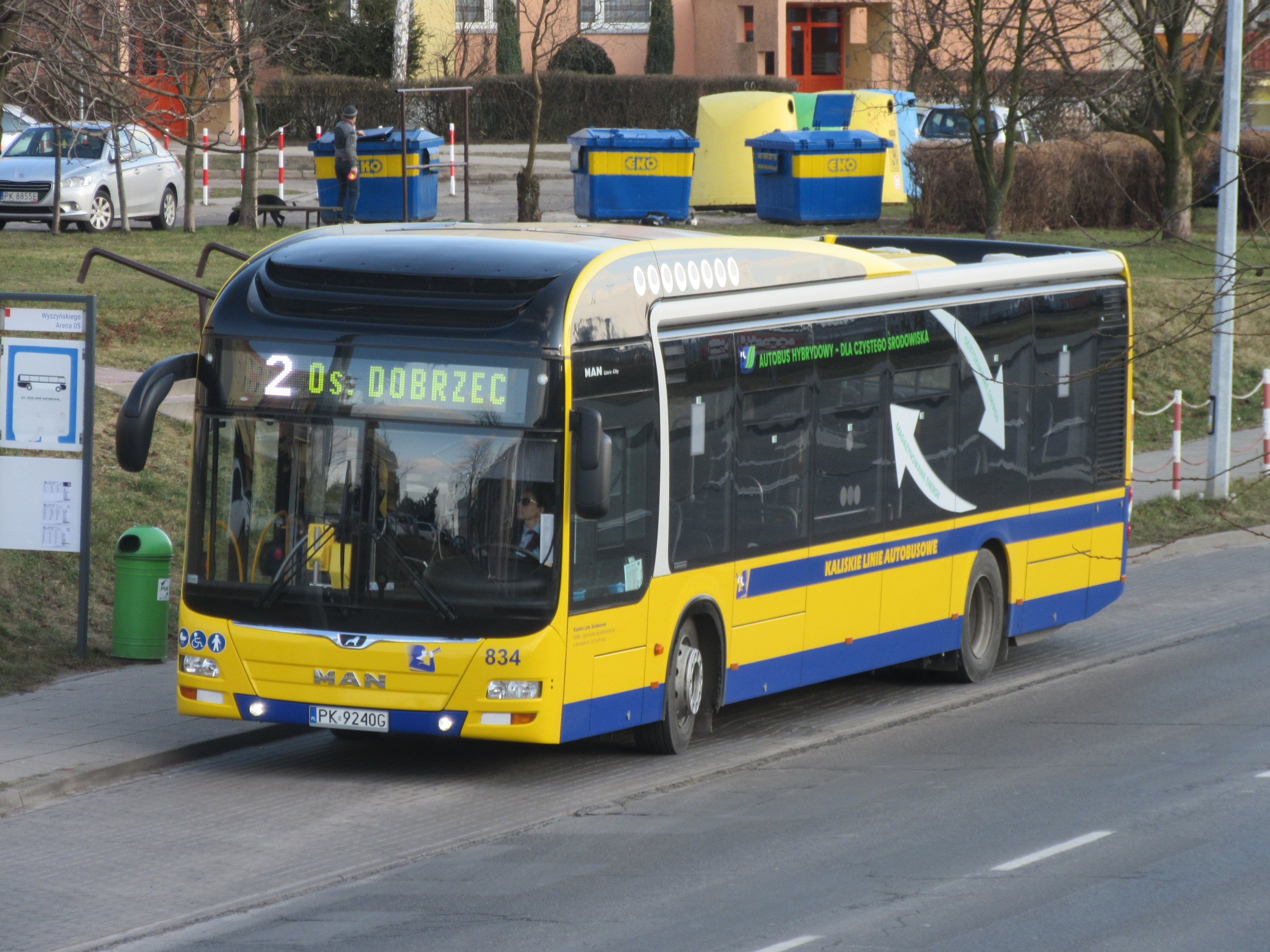 MAN Lion's City Hybrid Kaliskich Linii Autobusowych na przystanku Wyszyńskiego Arena w Kaliszu